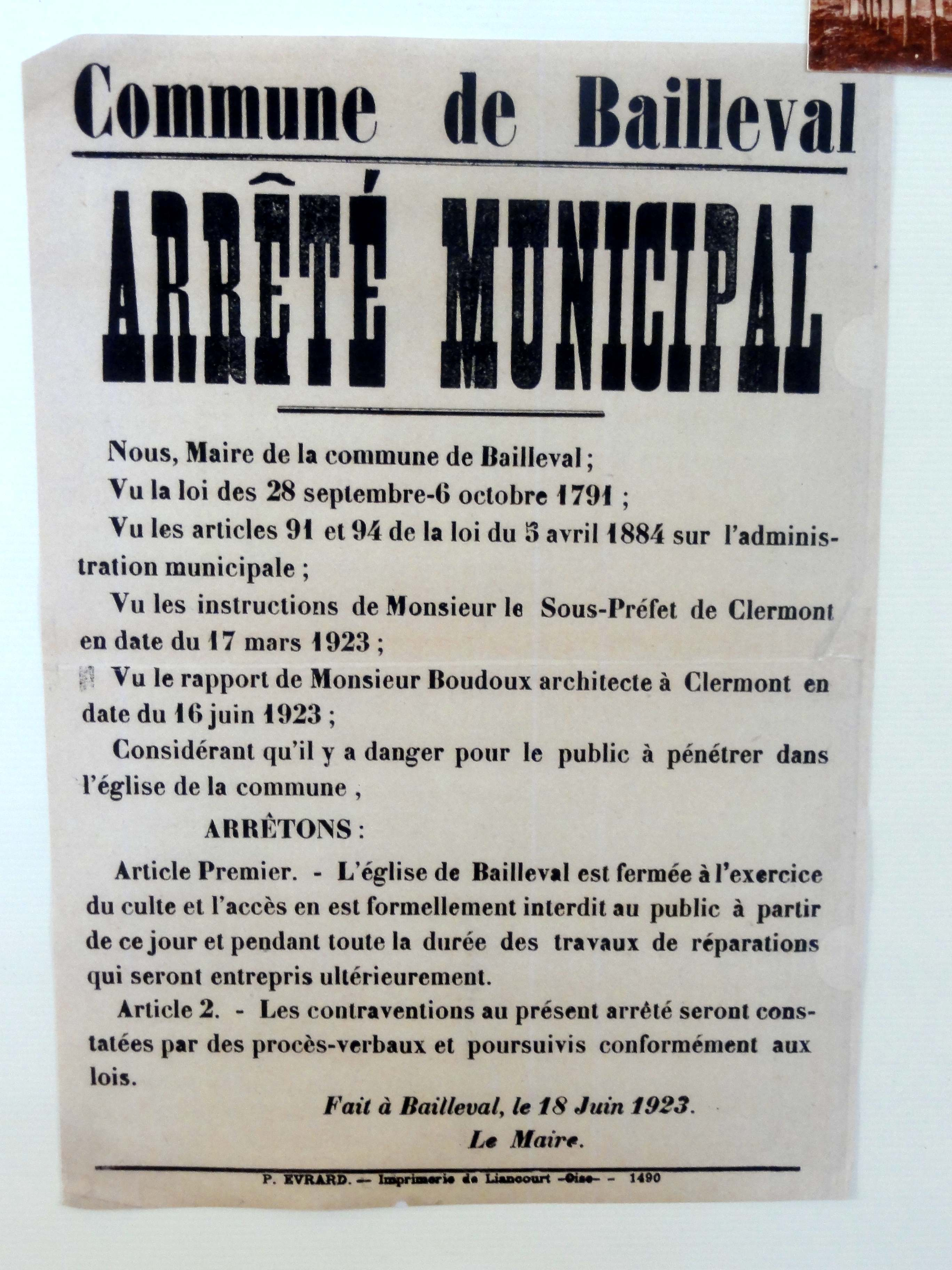 Mobilier de l'église - voir titre.